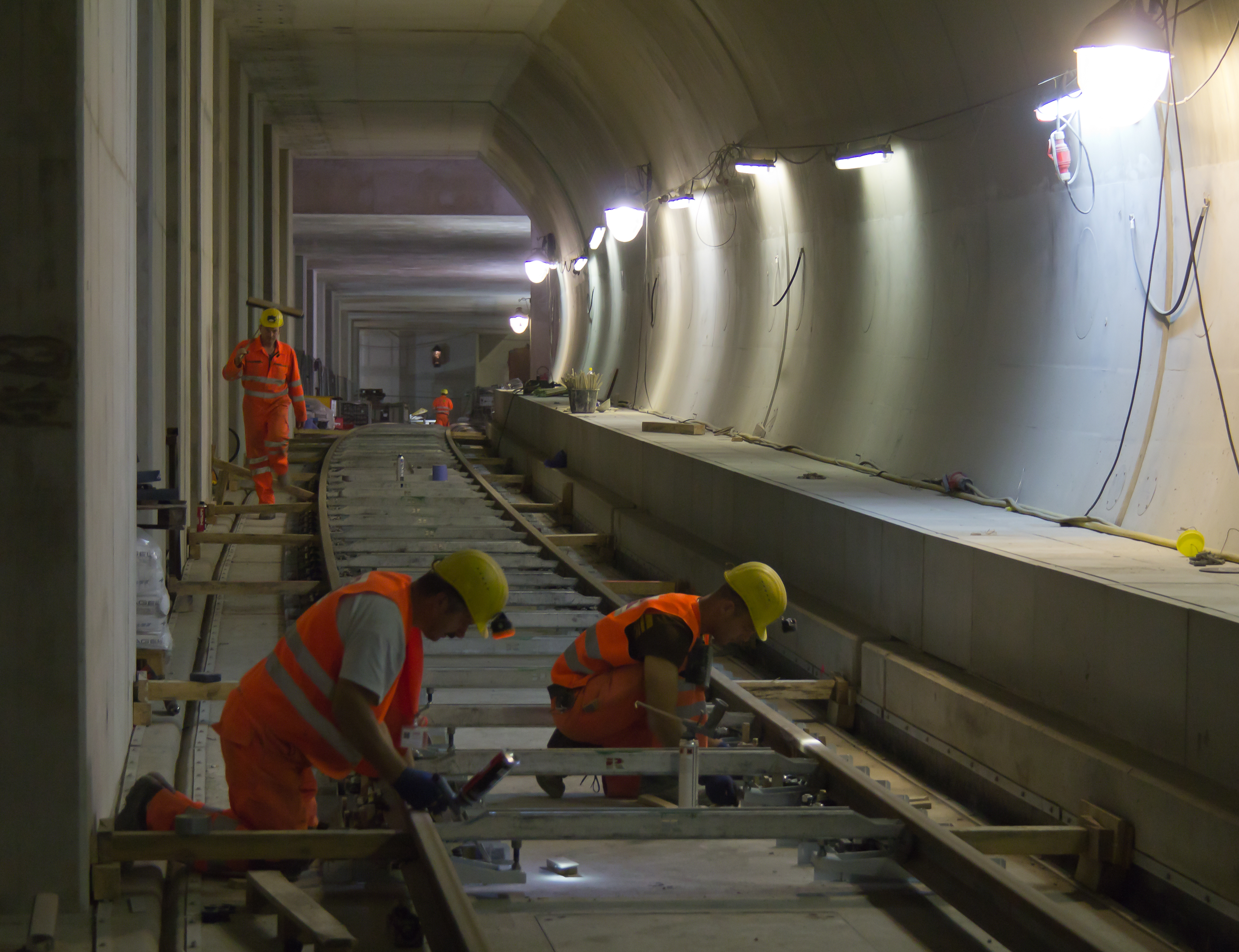 Nord-Süd-Stadtbahn Köln - Ausbau der Haltestelle „Rathaus“ sowie der Strecke in Richtung Breslauer Platz